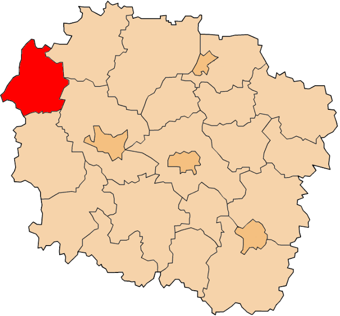 Powiat sępoleński na mapie województwa kujawsko-pomorskiego.